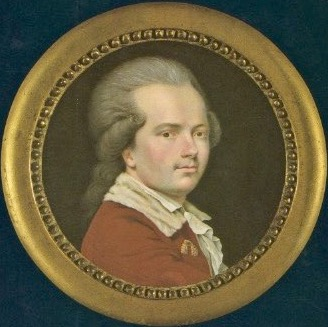 William Berczy = Johann Albrecht Ulrich Moll (1744–1813): In Florenz gemaltes Selbstporträt. Wasserfarbe und Gouache auf Elfenbein, ø 11,5 cm. Royal Ontario Museum, Toronto.